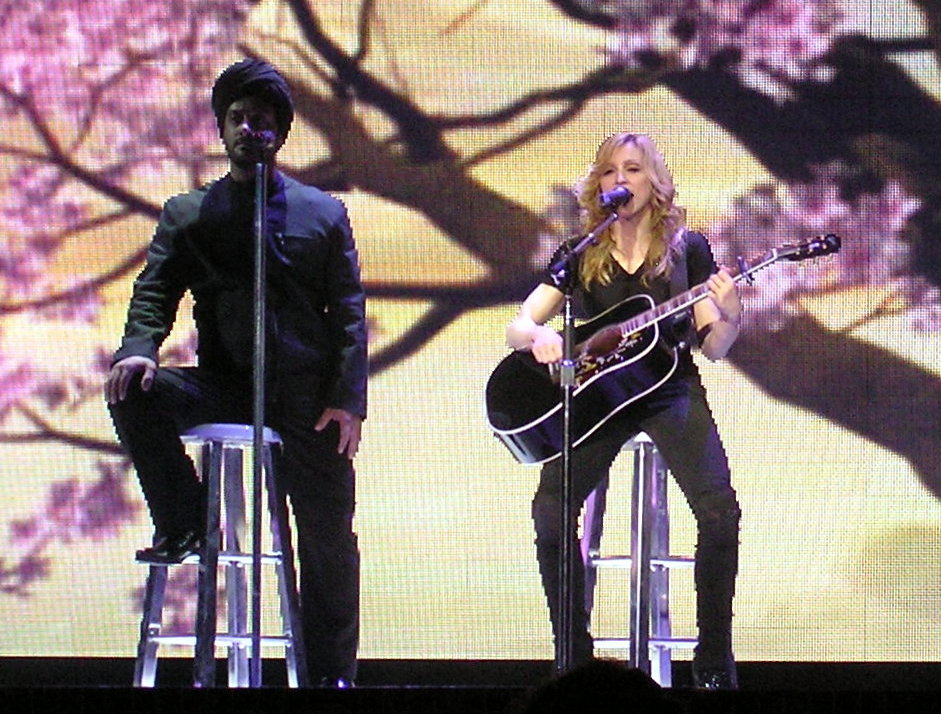 2006 6-5 Fresno trip (194)